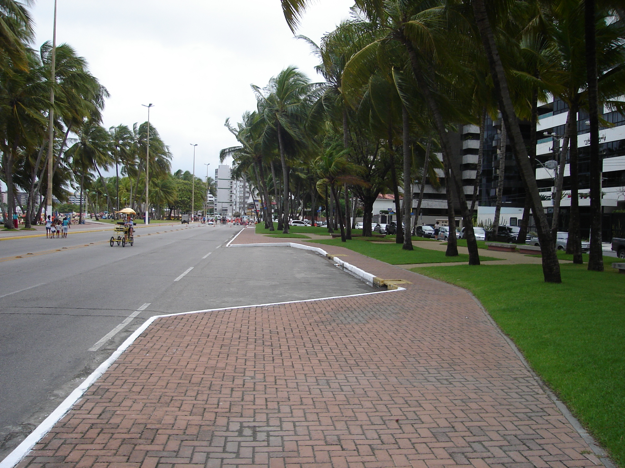 Sea side avenue of Maceió - AL